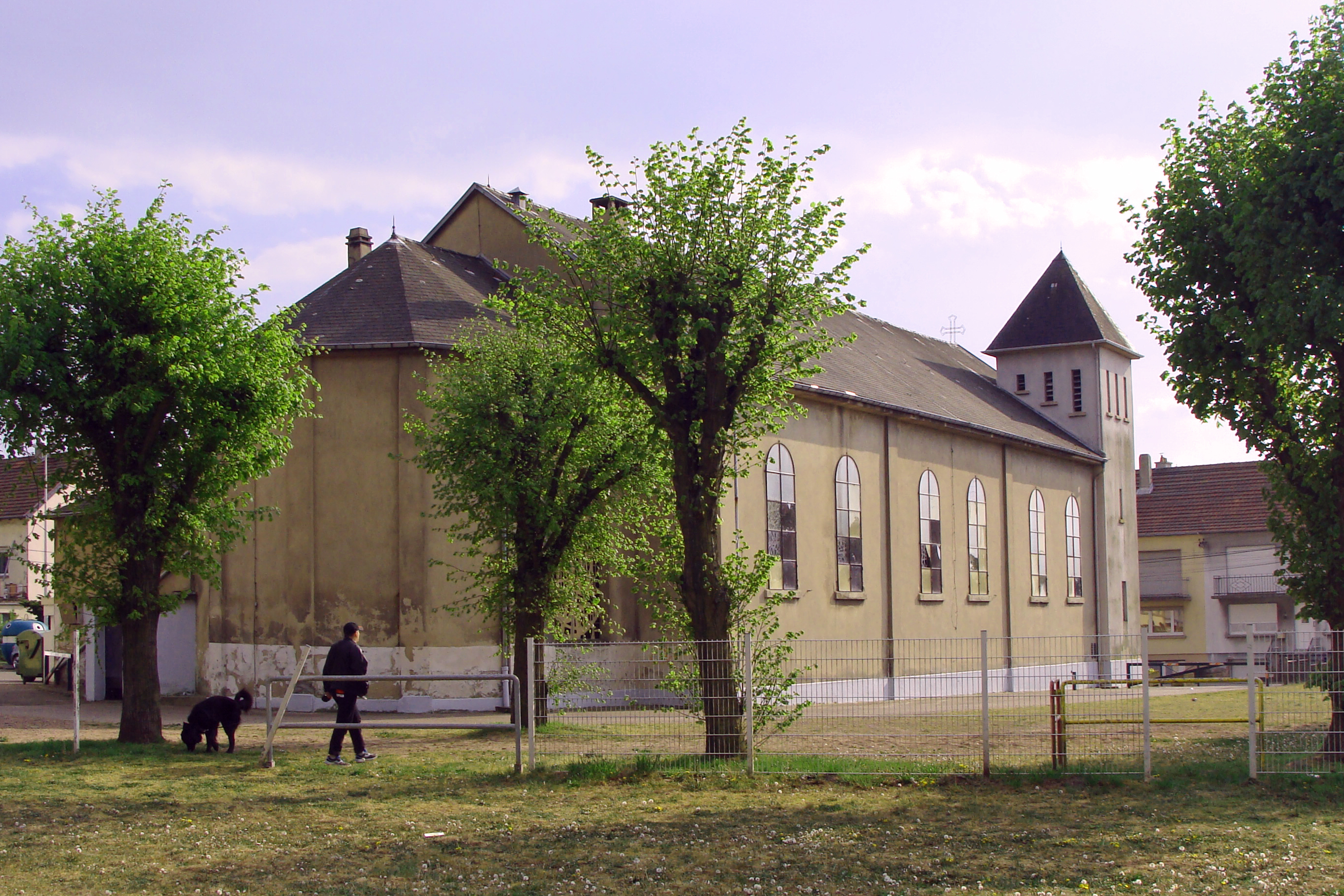 Église catholique Sainte-Barbe de la cité Bois-Richard de L'Hôpital (Moselle), vue du chevet.